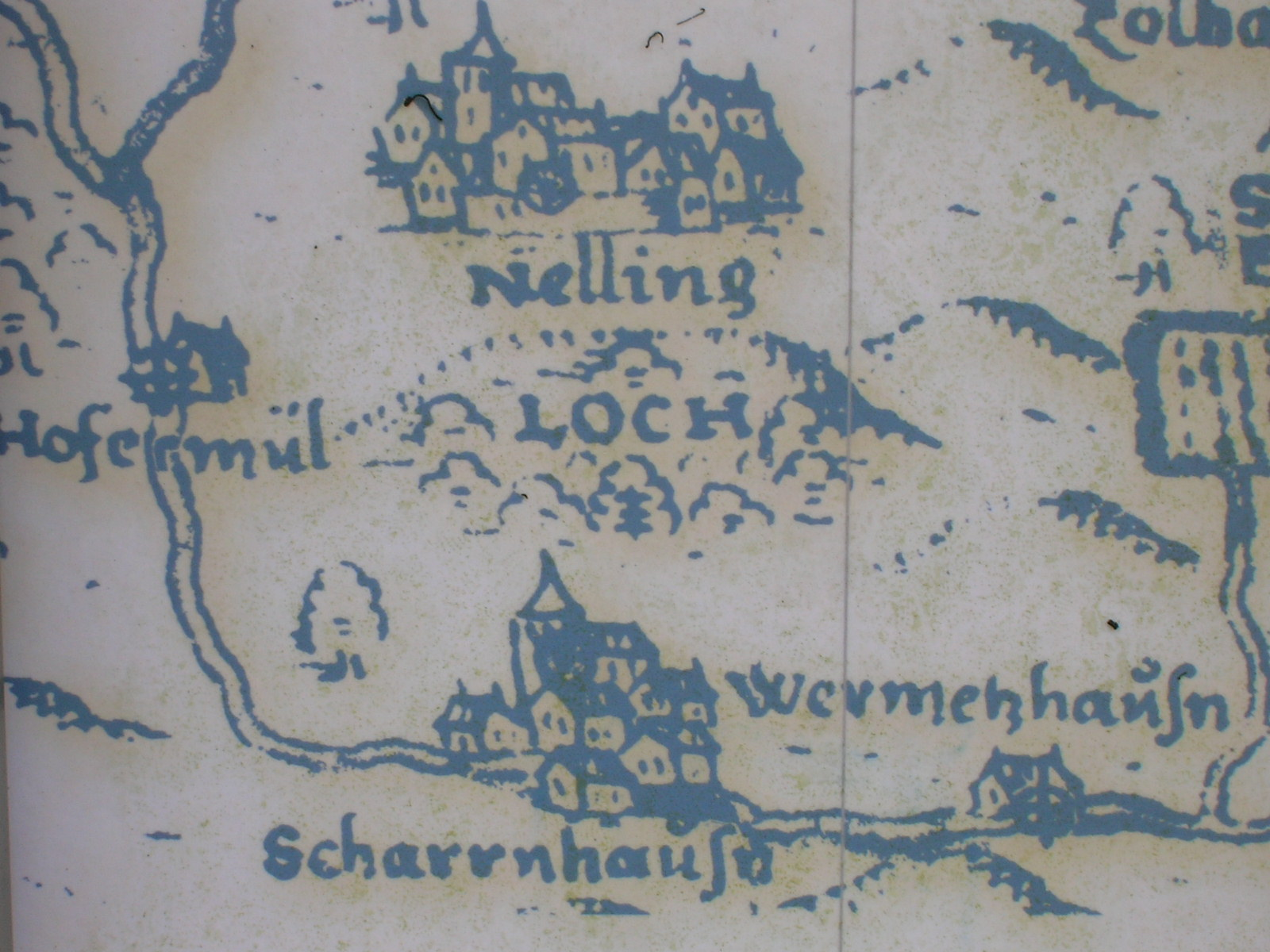 Verschwundener Ort Wörnitzhausen, selbst fotografiert am 09.08.2005